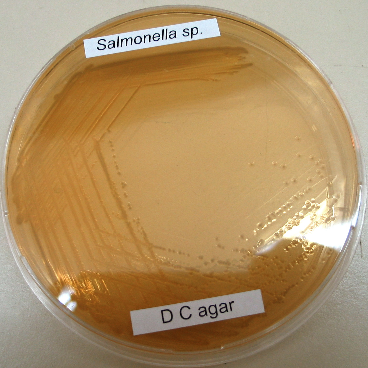 A microbiological culture of Salmonella sp. bacteria on DC agar culture medium